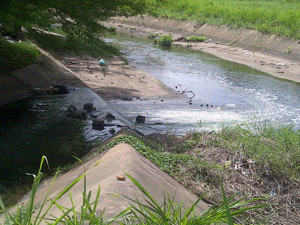 Canalización del Rio Yocoima, en tiempos de sequía, se Observa la contaminación común en este rio